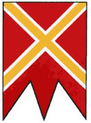 Vlajka Štrby